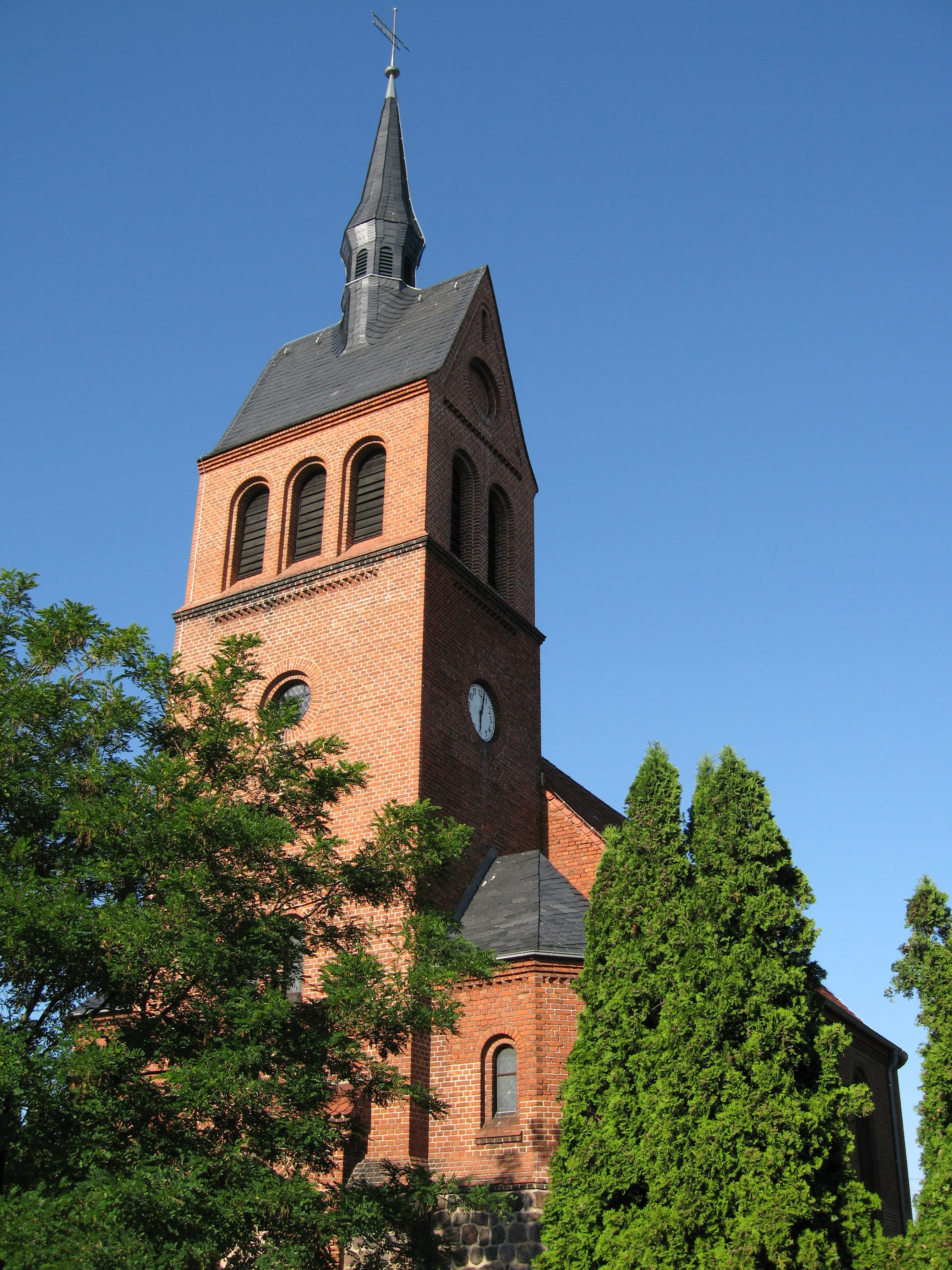 Kirche des Ortes Stolzenhagen in der Gemeinde Wandlitz, Landkreis Barnim, Land Brandenburg, Deutschland